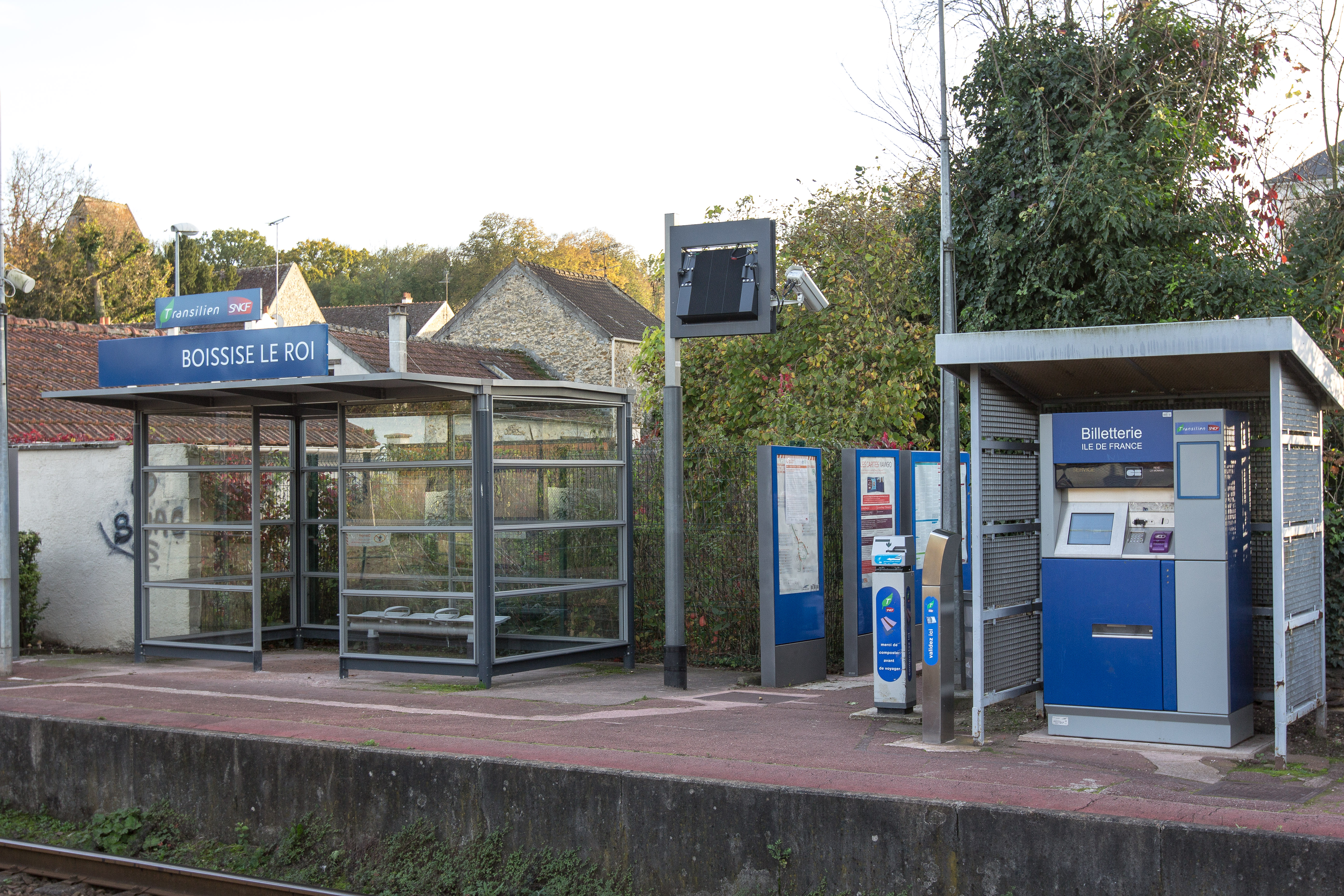 Gare de Boissise-le-Roi / Essonnes / France